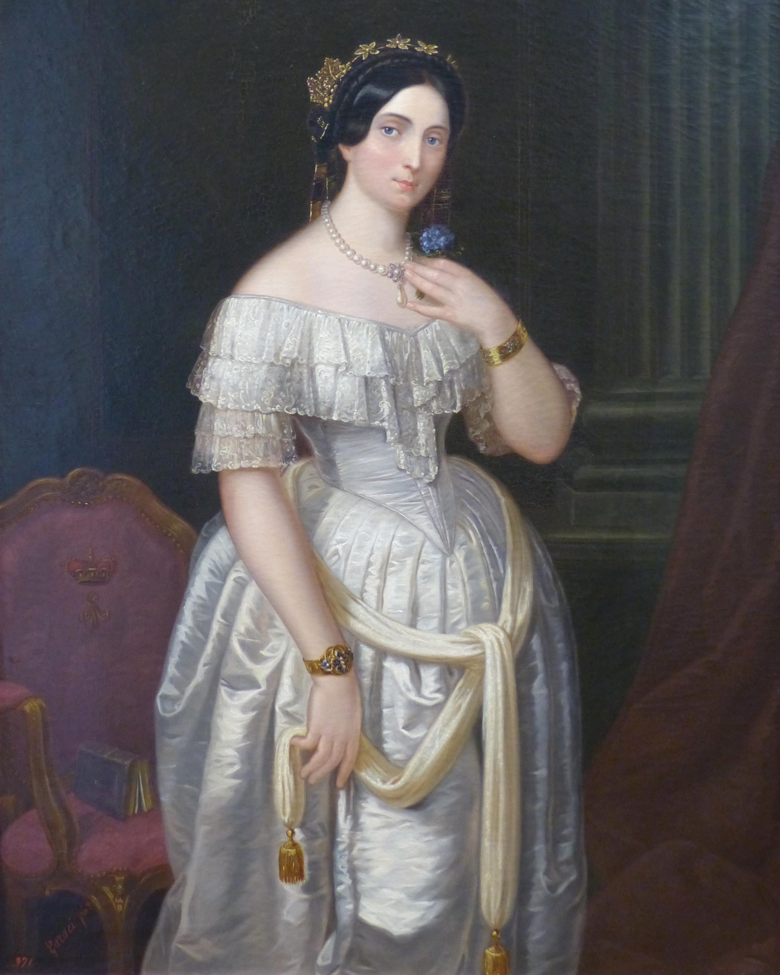 Nice (Alpes-Maritimes, France), sur la promenade des Anglais, la Villa (palais plutôt) Masséna, siège du musée du même nom. Maria-Letizia Bonaparte-Wyse, célèbre auteur, entre autres, de Nizza la Bella, épouse de Frédéric de Solms, puis du ministre du gouvernement piémontais, le comte Rattazzi; portrait vers 1858 par le niçois Carlo Garacci (1818-1895).